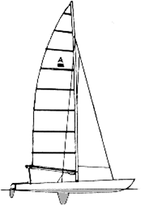 Catamarano classe A